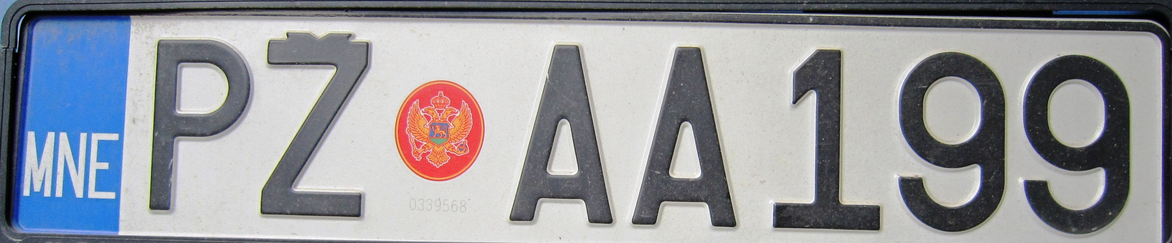 kentekenplaat Montenegro